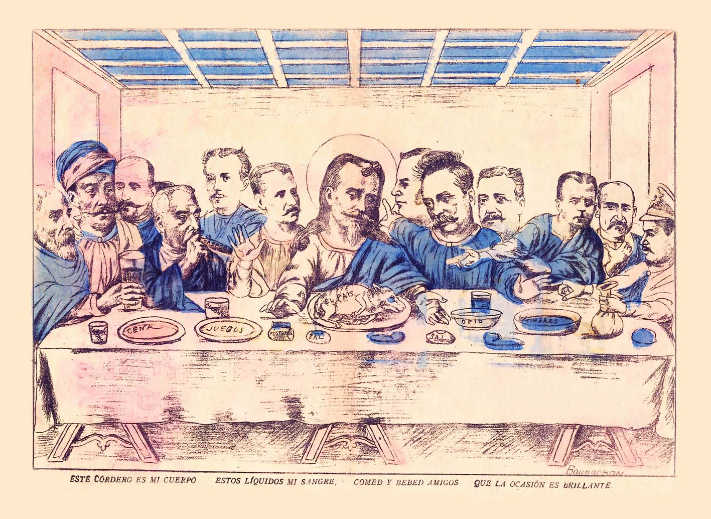 Gobernantes del Perú desde San Martín hasta Piérola